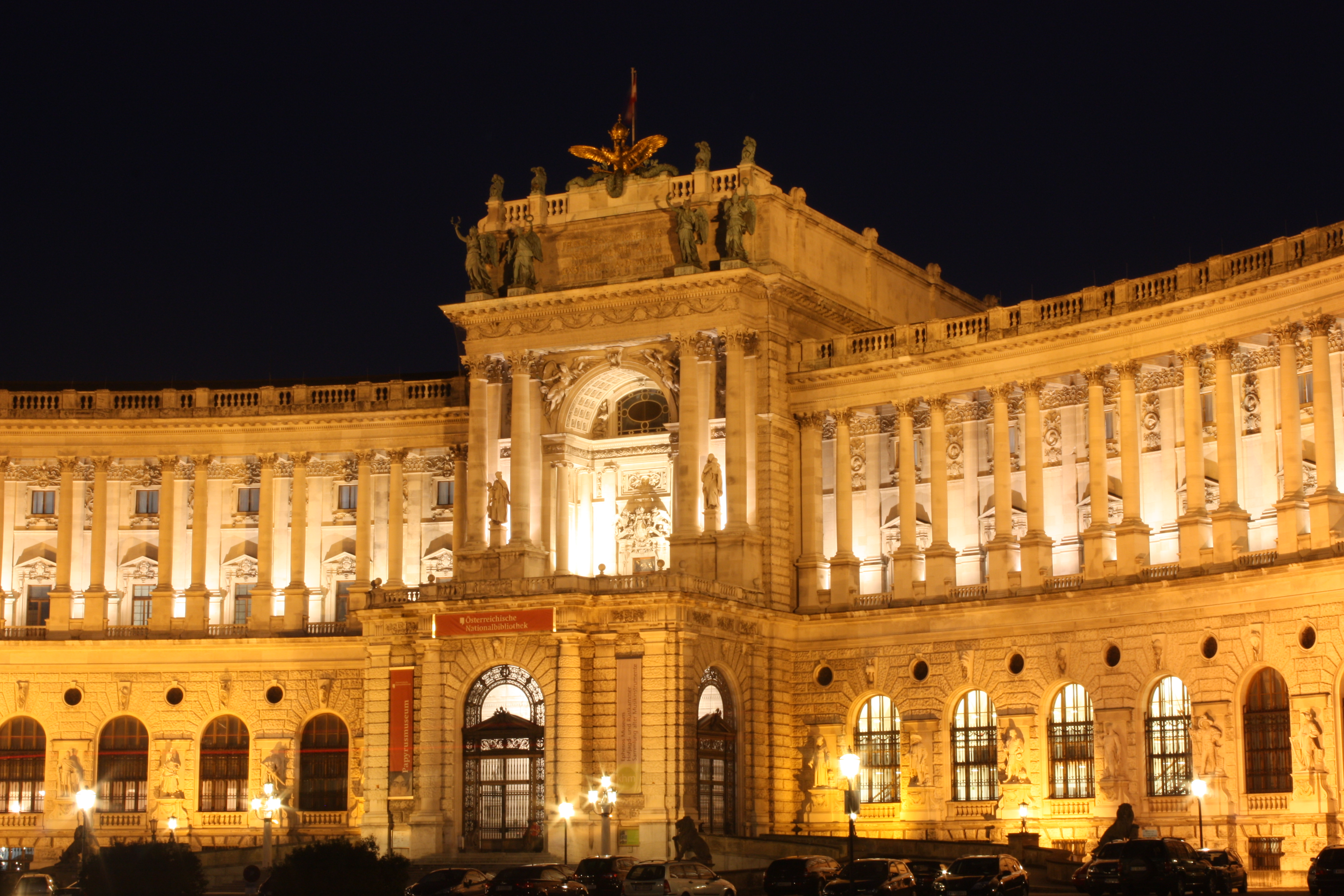 Night in Vienna Vienna, Wien